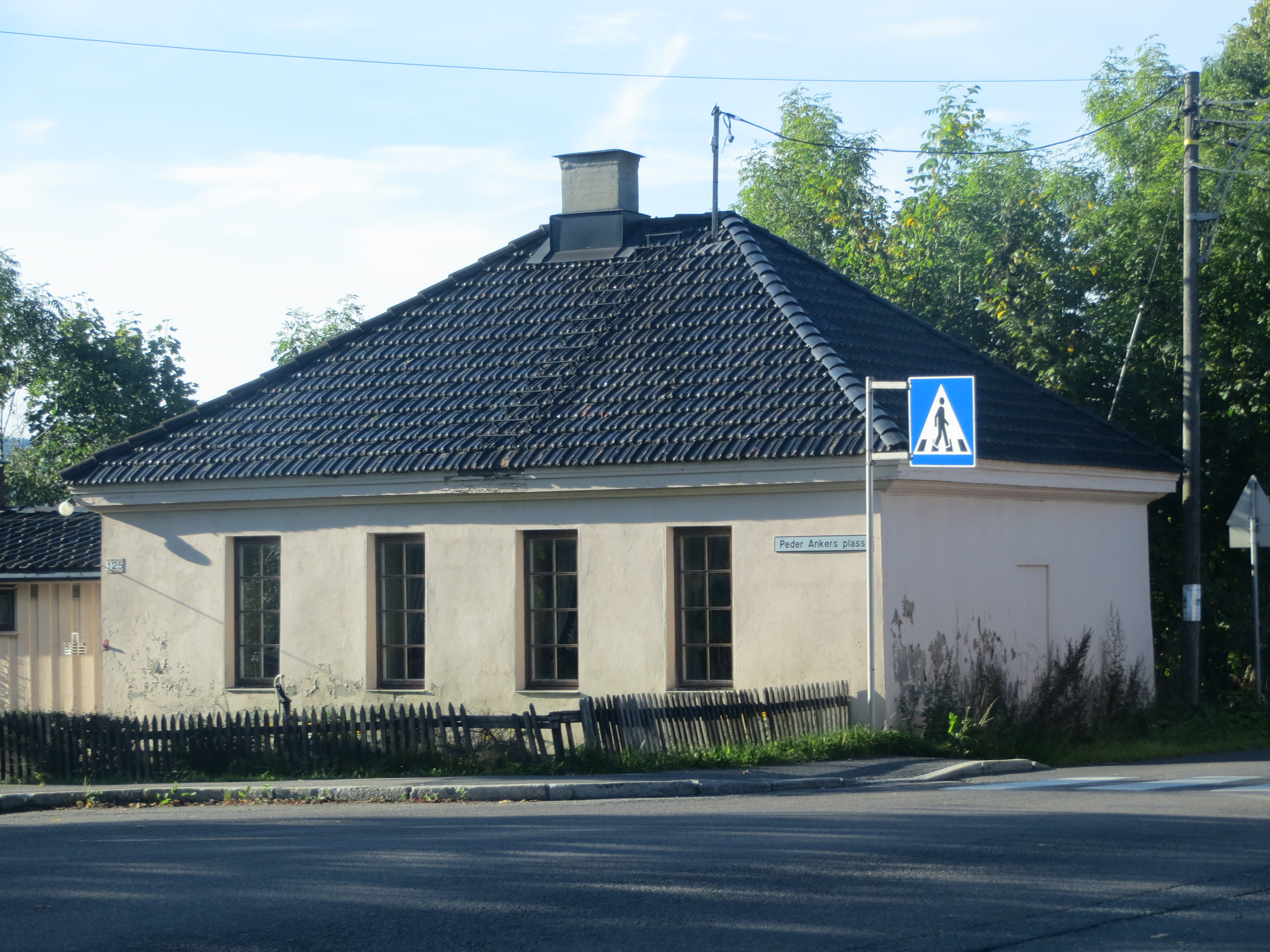 Ankerveien - portnerstue tilhørende Bogstad gård. Bydel Vestre Aker, Oslo.